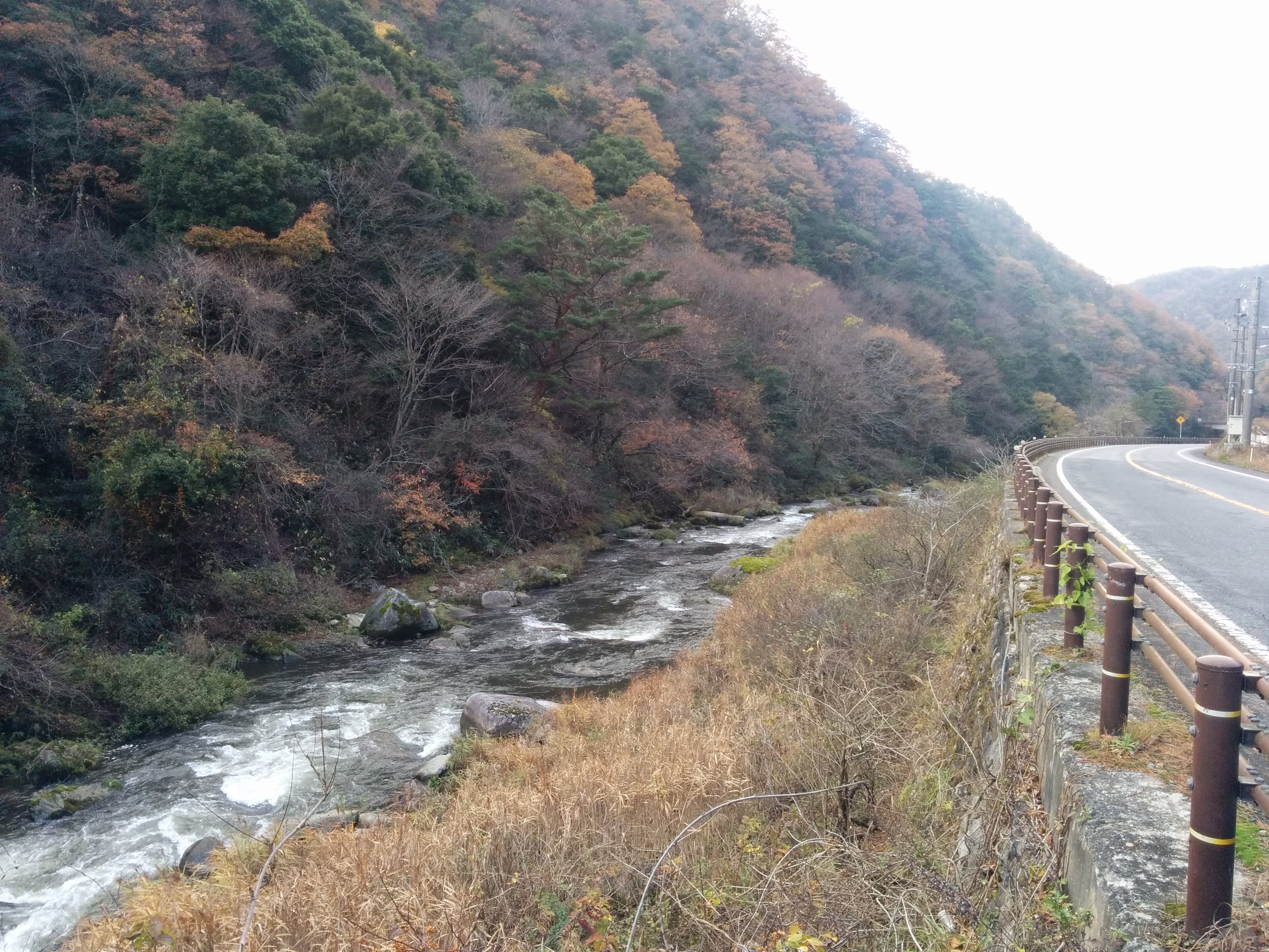 鳥取県日野郡日南町に位置する渓谷。景勝地。